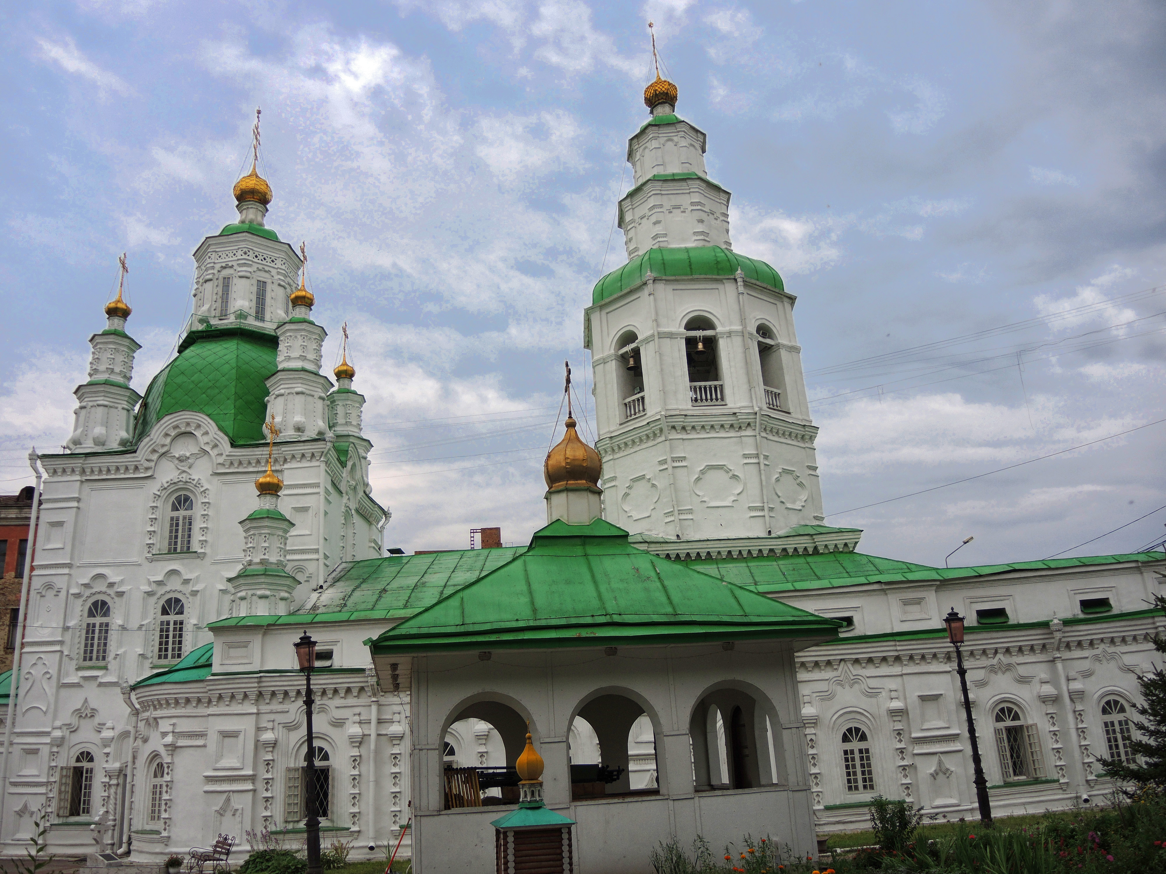 Церковь Покрова Пресвятой Богородицы: улица Сурикова, 26, Красноярск, Красноярский край